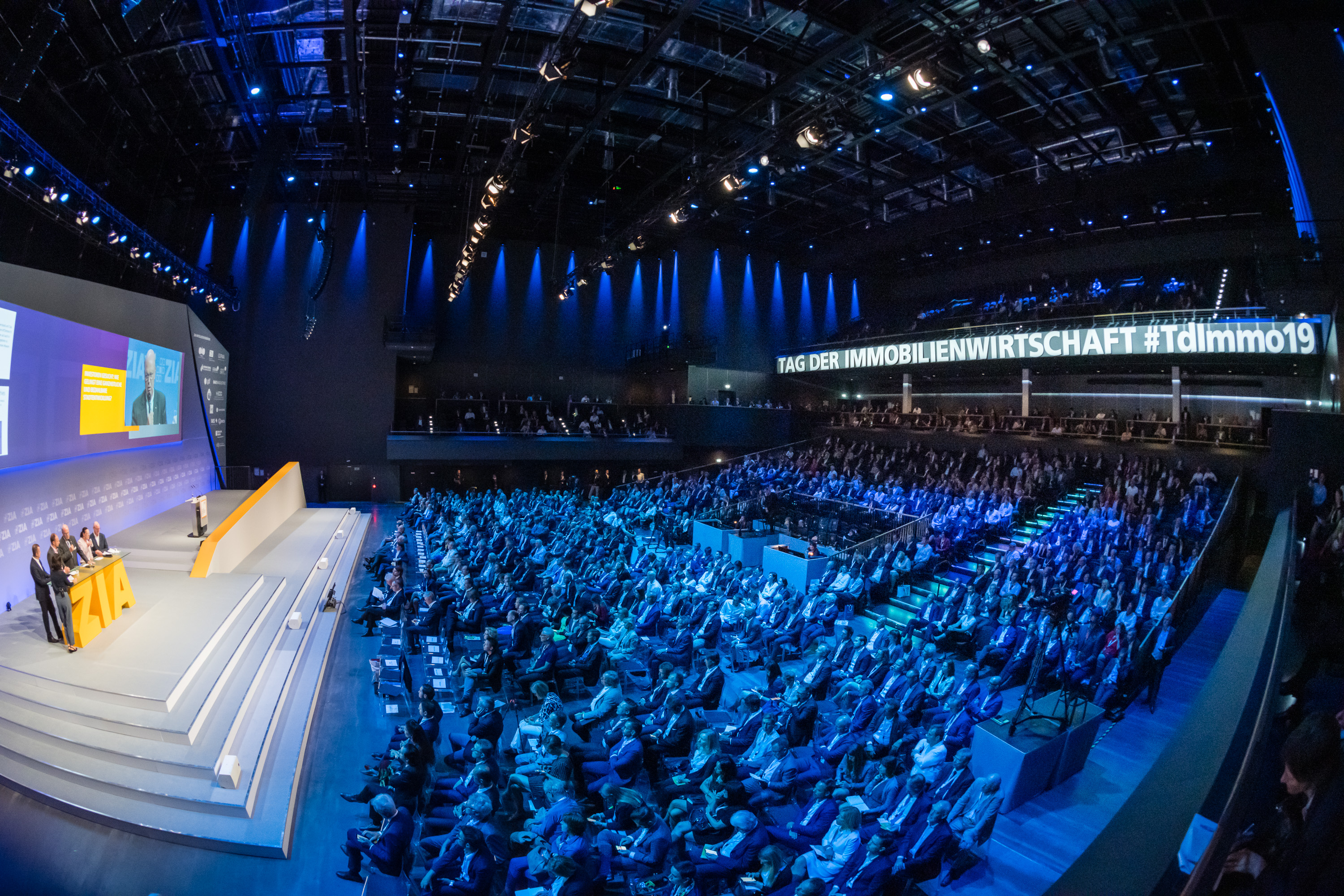 Rund 2.000 Besucher beim Tag der Immobilienwirtschaft 2019 in der Verti Music Hall in Berlin